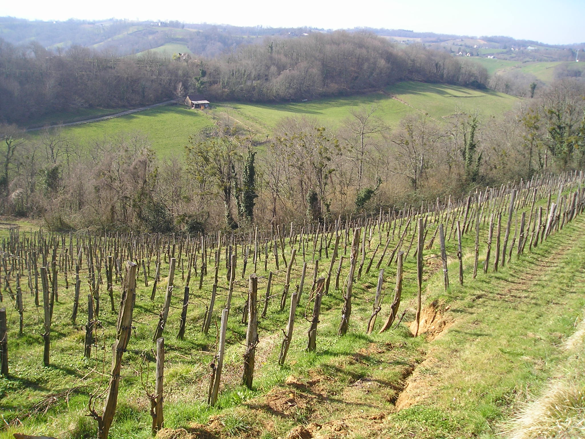 Vineyards at Clos Lapeyre Jurançon